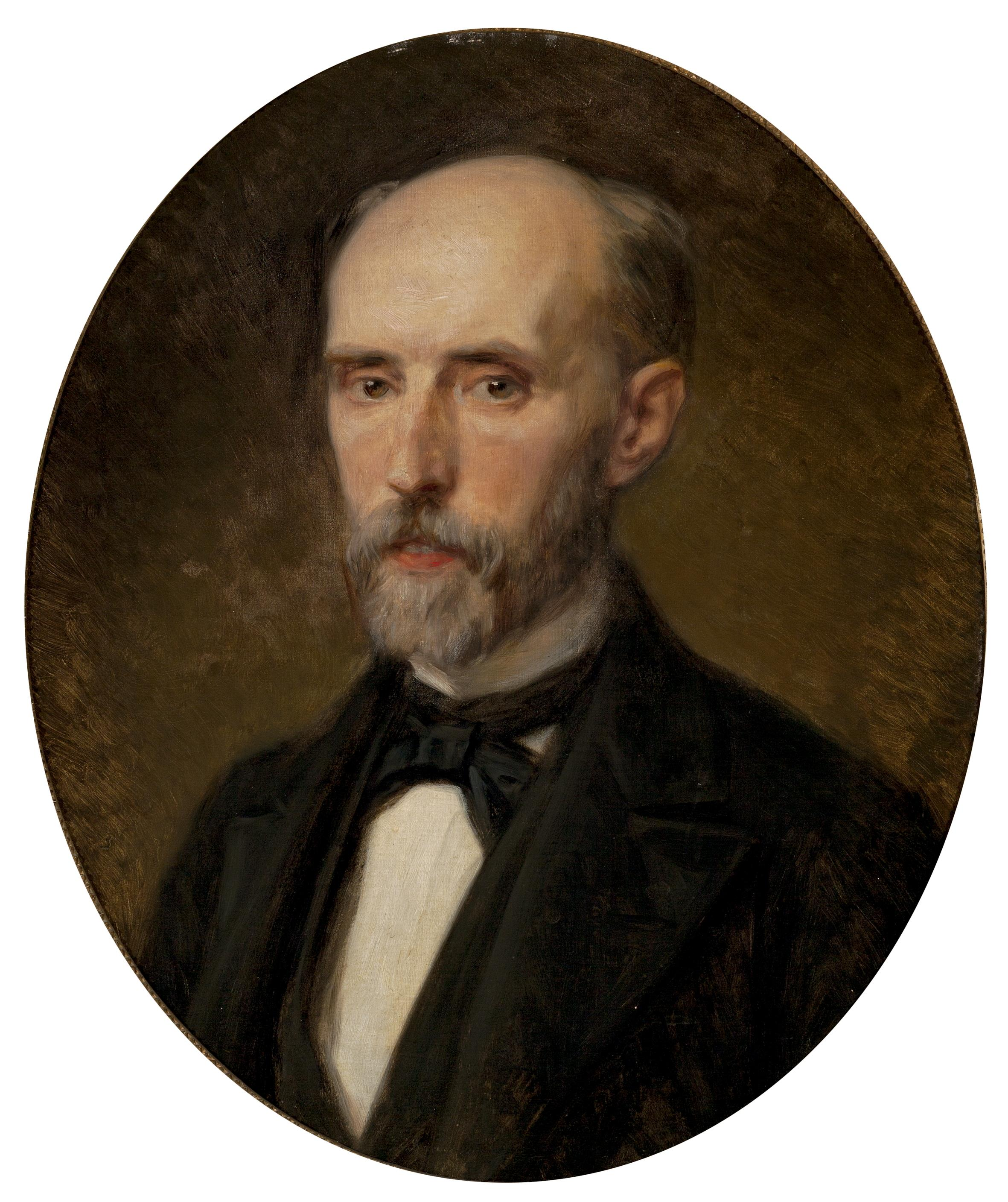 Este retrato de la cabeza de Pedro Salaverría Charitu (1821-1896), seguramente sea el preparatorio para otro pintado por Madrazo del mismo personaje, conservado en el Banco de España, Pedro Salaverría Charitu, gobernador del Banco de España, de 1833, una efigie oficial en la que se le representa de cuerpo entero y sentado en plena ocupación de su cargo (Texto extractado de Díez, J.L.: Federico de Madrazo (1815-1894). Museo del Prado, 1994, p.456).